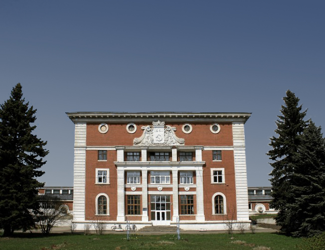 Северная водопроводная станция в Москве.